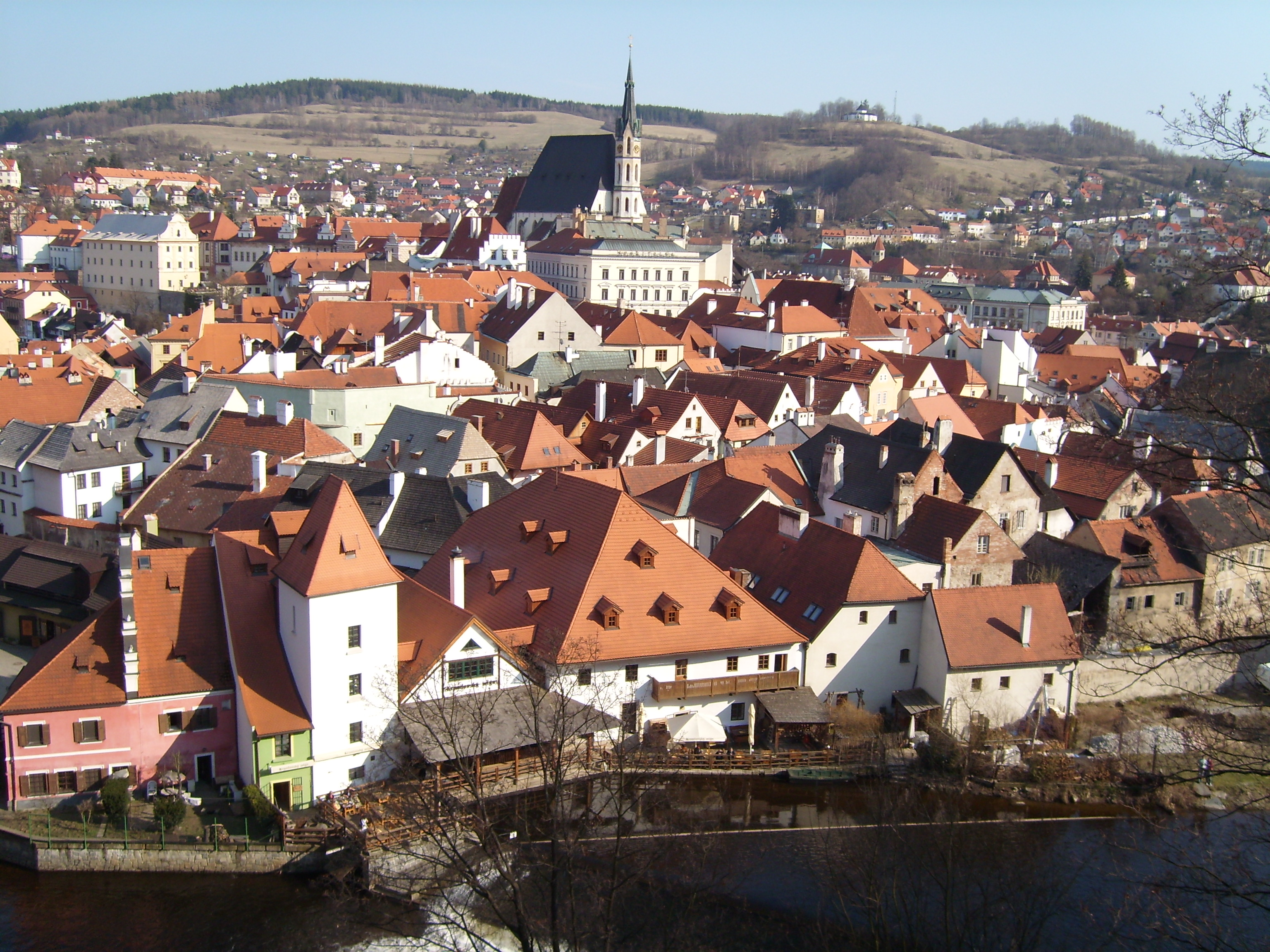 View from the castle